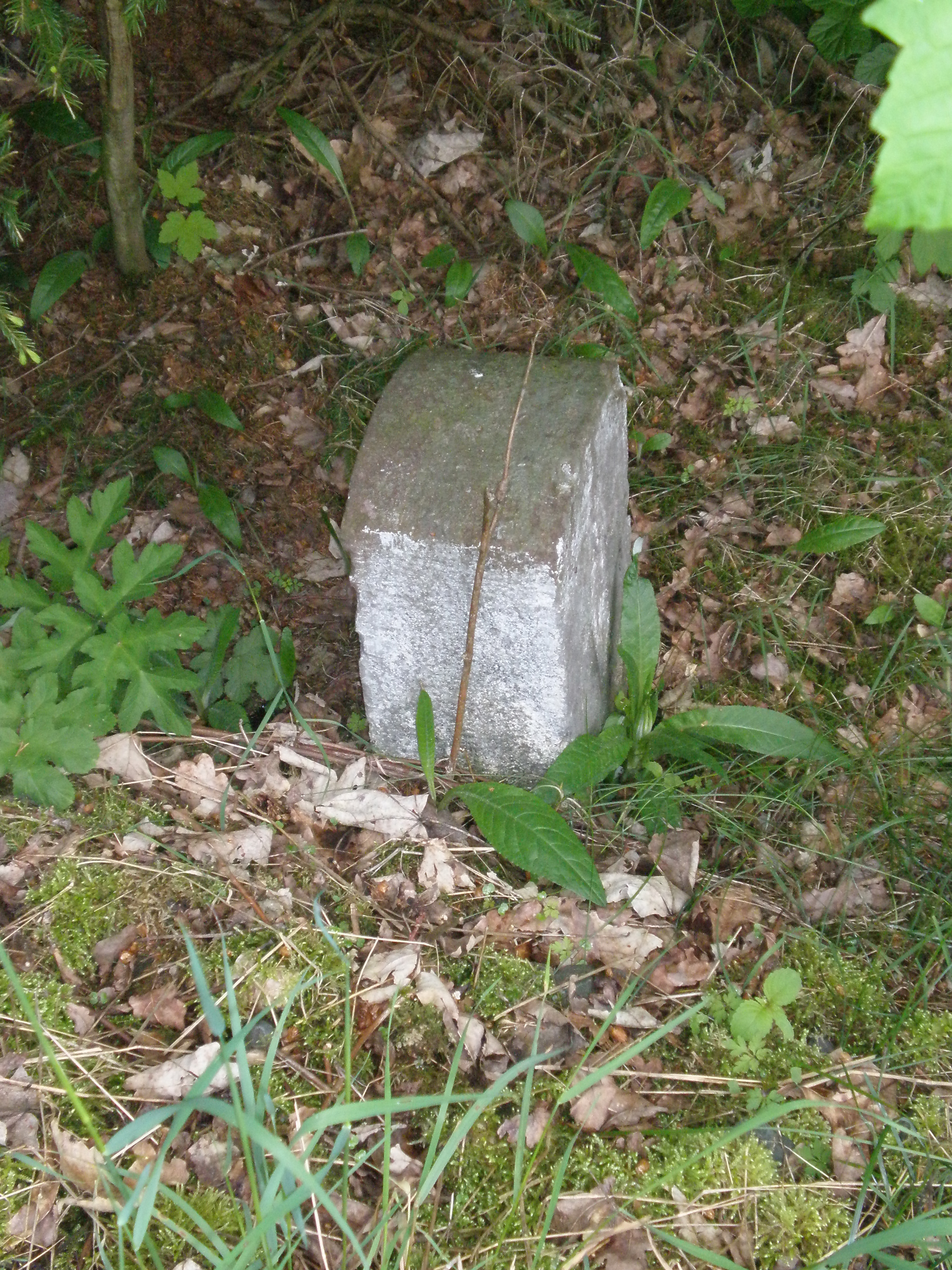 Ein Kilometerstein der ehemaligen Lokalbahnstrecke Falls-Gefrees